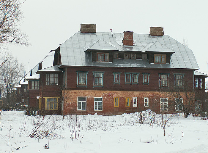 Кооперативный поселок в г. Вичуге (1925-1930)